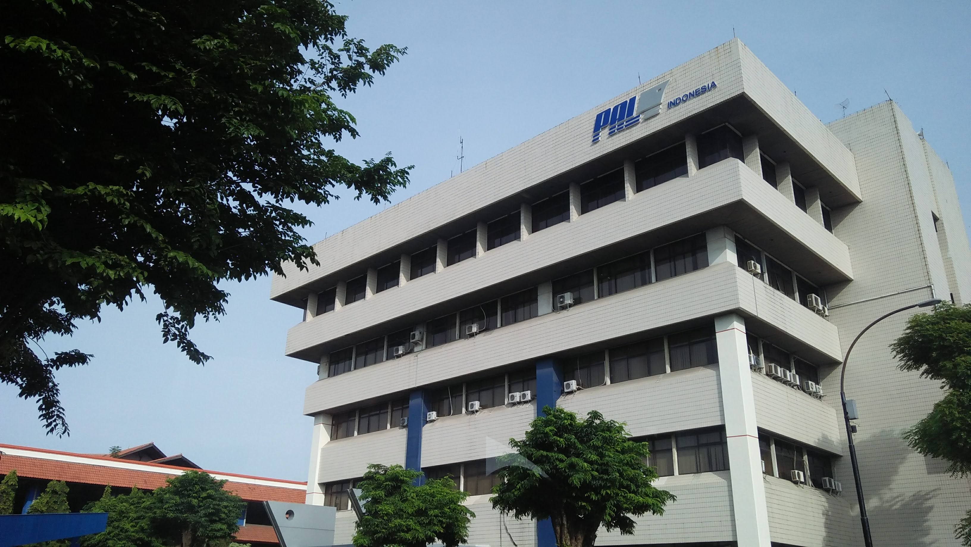 PT PAL Jan 2018